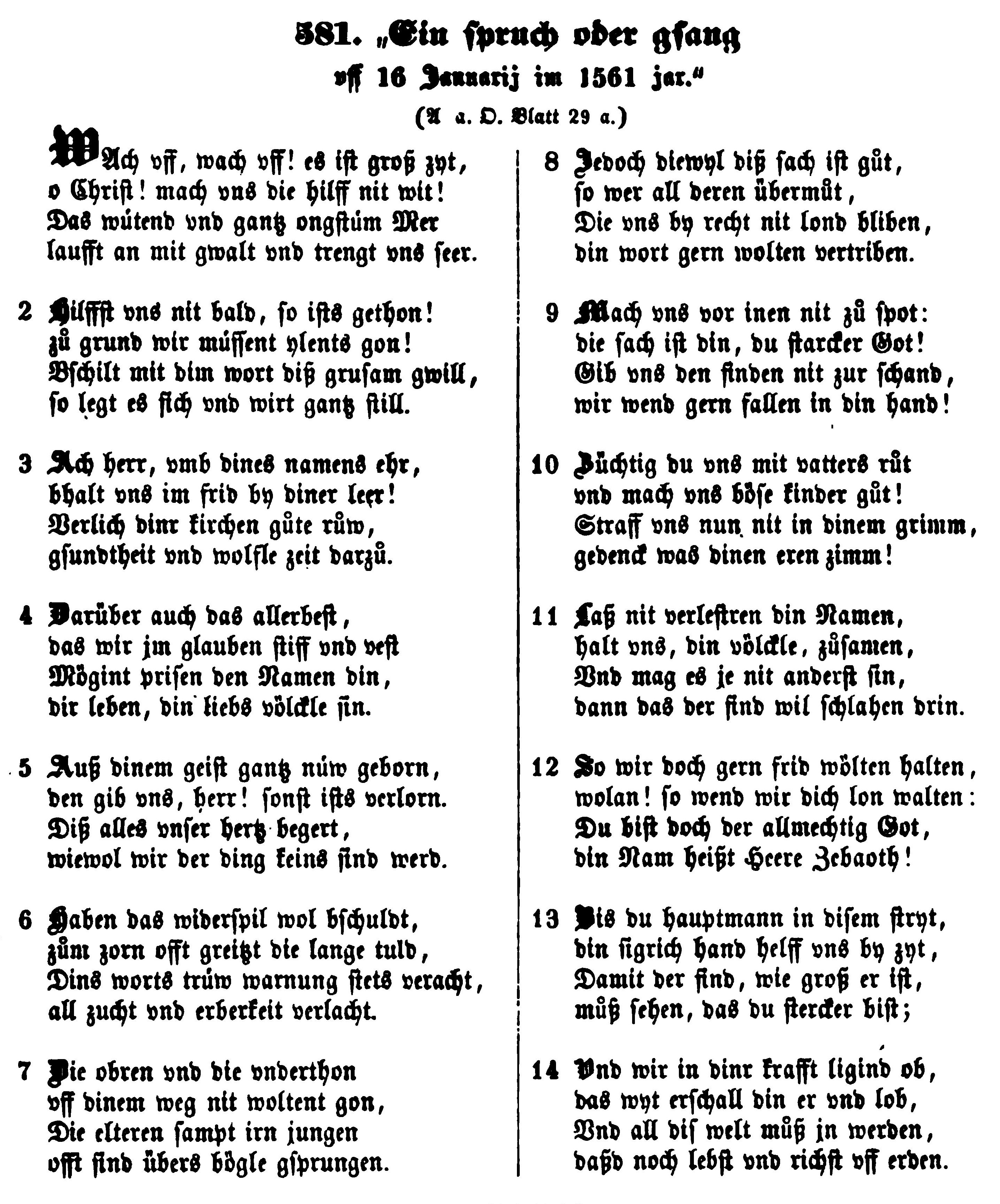 Ambrosius Blarer: Wach vff, wach vff! es ist groß zyt, Abdruck 1841 der Handschrift von 1562